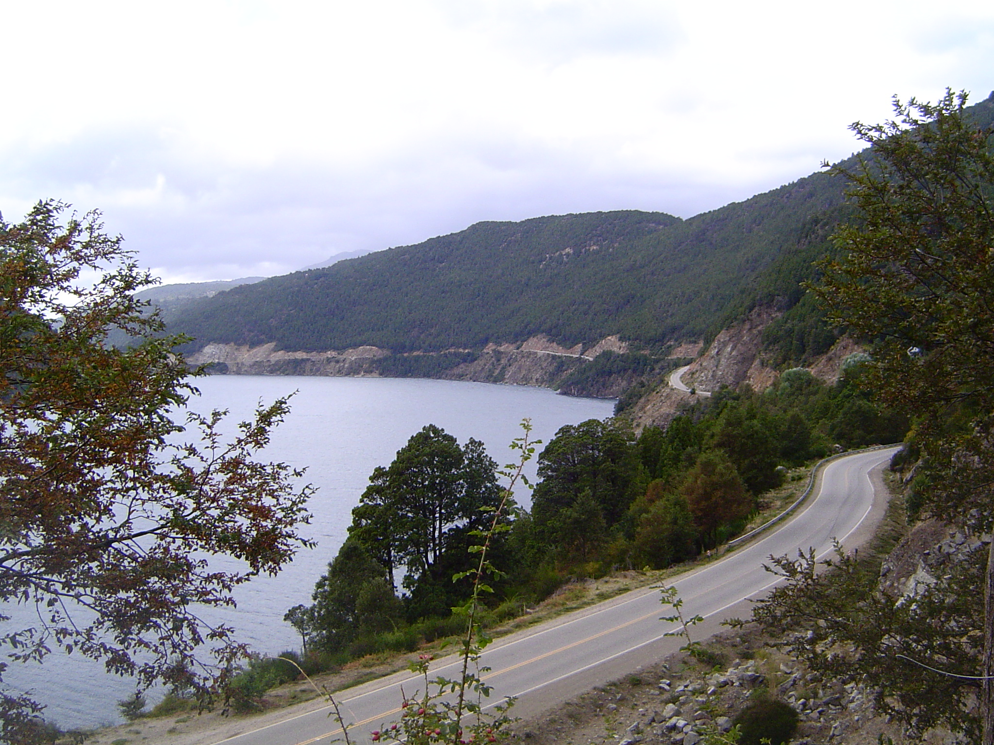 Camino de los siete lagos Ruta Nacional 234, la "Ruta de los siete lagos". Bordeando en este caso el lago Lácar a la altura de Playa Catritré, en las inmediaciones de San Martín de los Andes.